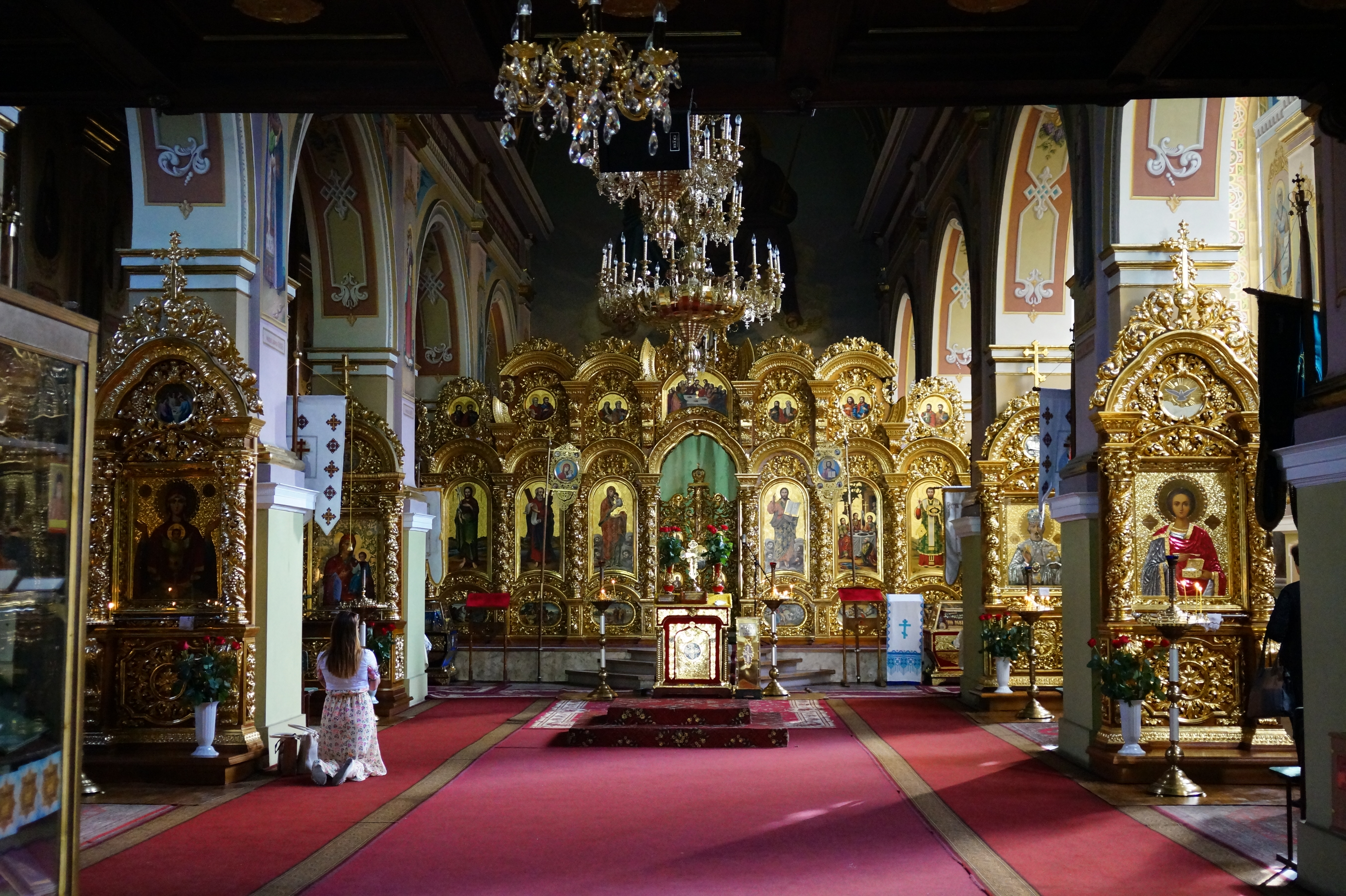 Костел єзуїтів (мур.), Івано-Франківськ, вул. Грюнвальдська, 1